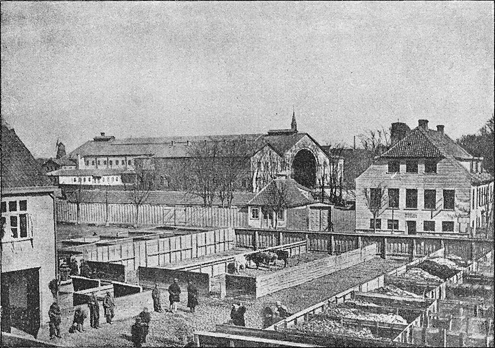 Trommesalen på Vesterbro.